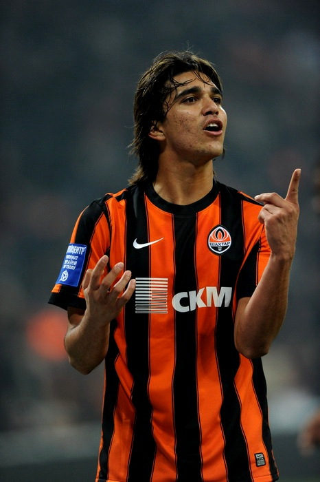 В матче против Запорожского Металлурга.